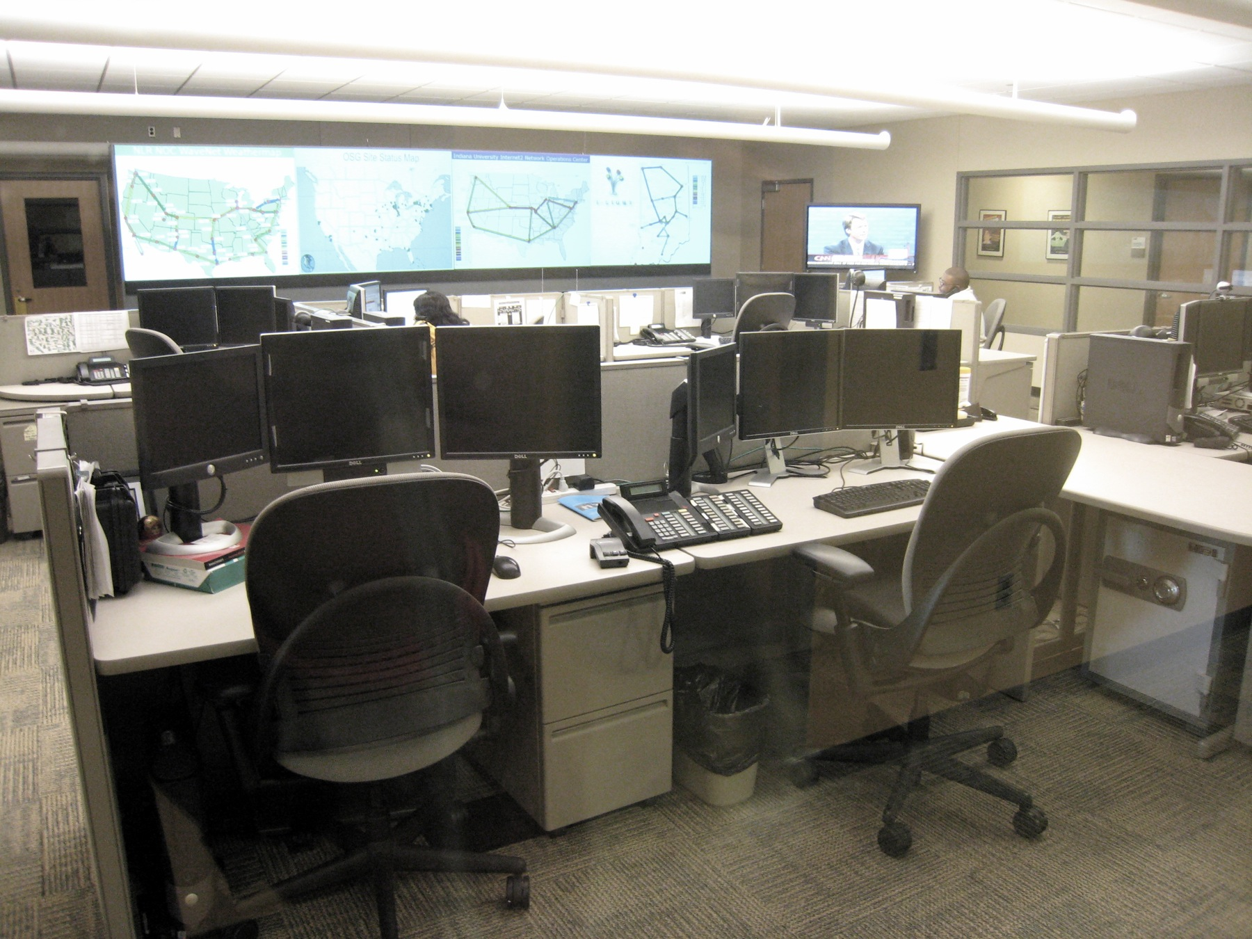 Iupui